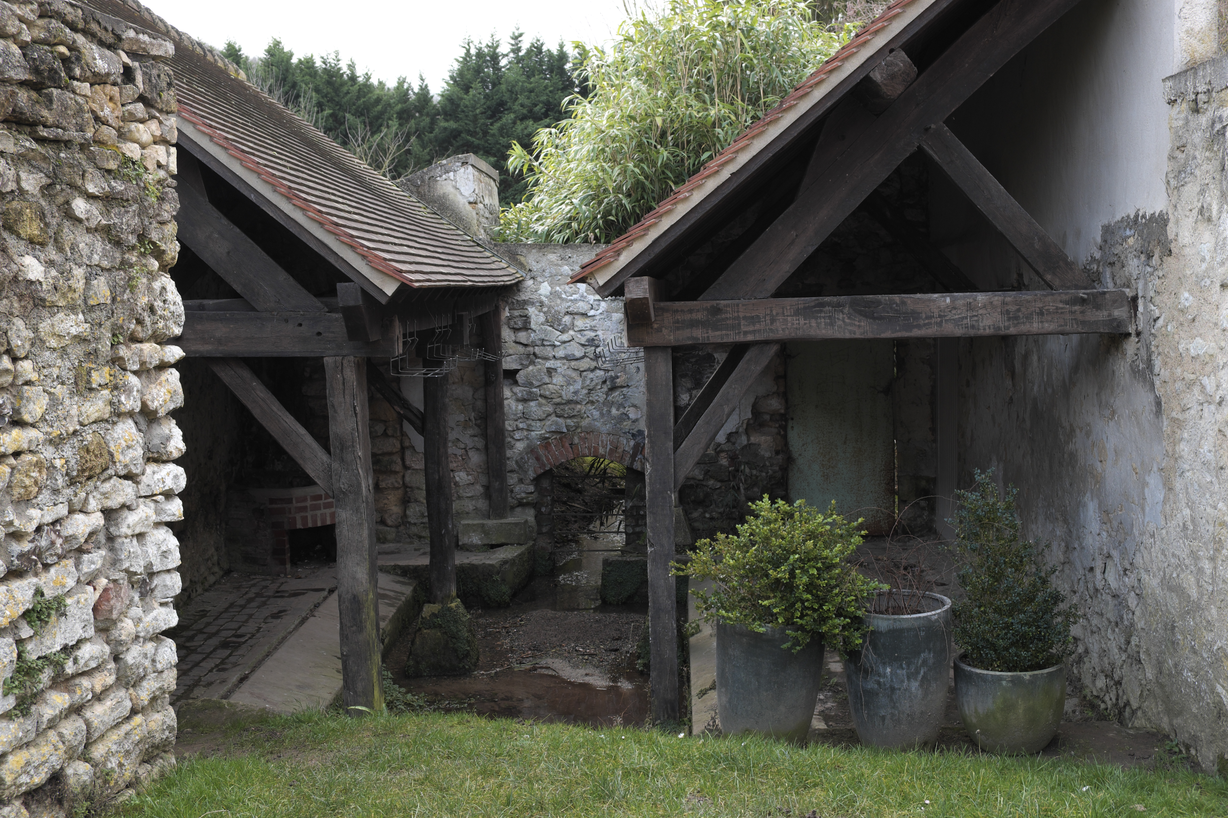 Waschhaus in Vétheuil im Département Val-d’Oise in der Region Île-de-France (Frankreich)